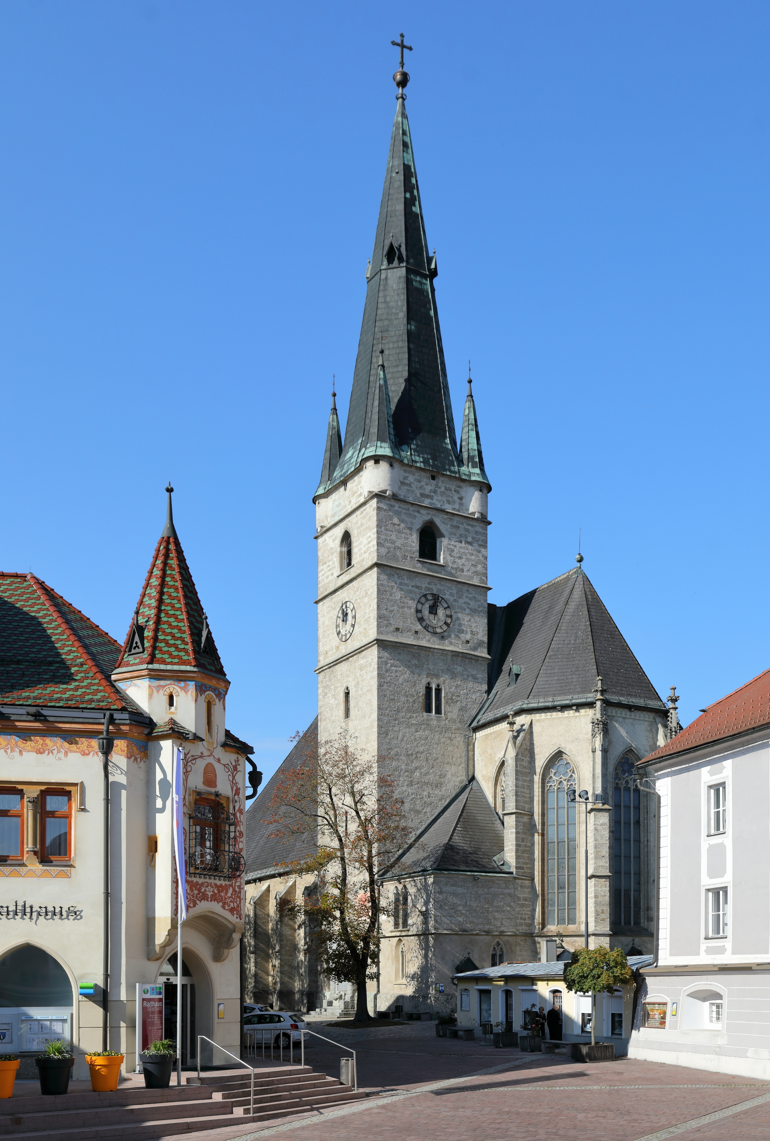 Ostsüdostansicht der röm.-kath. Pfarrkirche hl. Michael in der niederösterreichischen Stadt Haag mit dem Rathaus links und dem Pfarrhof rechts. Die spätgotische Staffelkirche mit Langchor und mächtigem Chorseitenturm wurde im 15. Jahrhundert errichtet. Der Pfarrhof ist im Kern mittelalterlich und das Rathaus wurde Ende des 19. Jahrhunderts im neugotischen Stil als Sparkassengebäude errichtet.